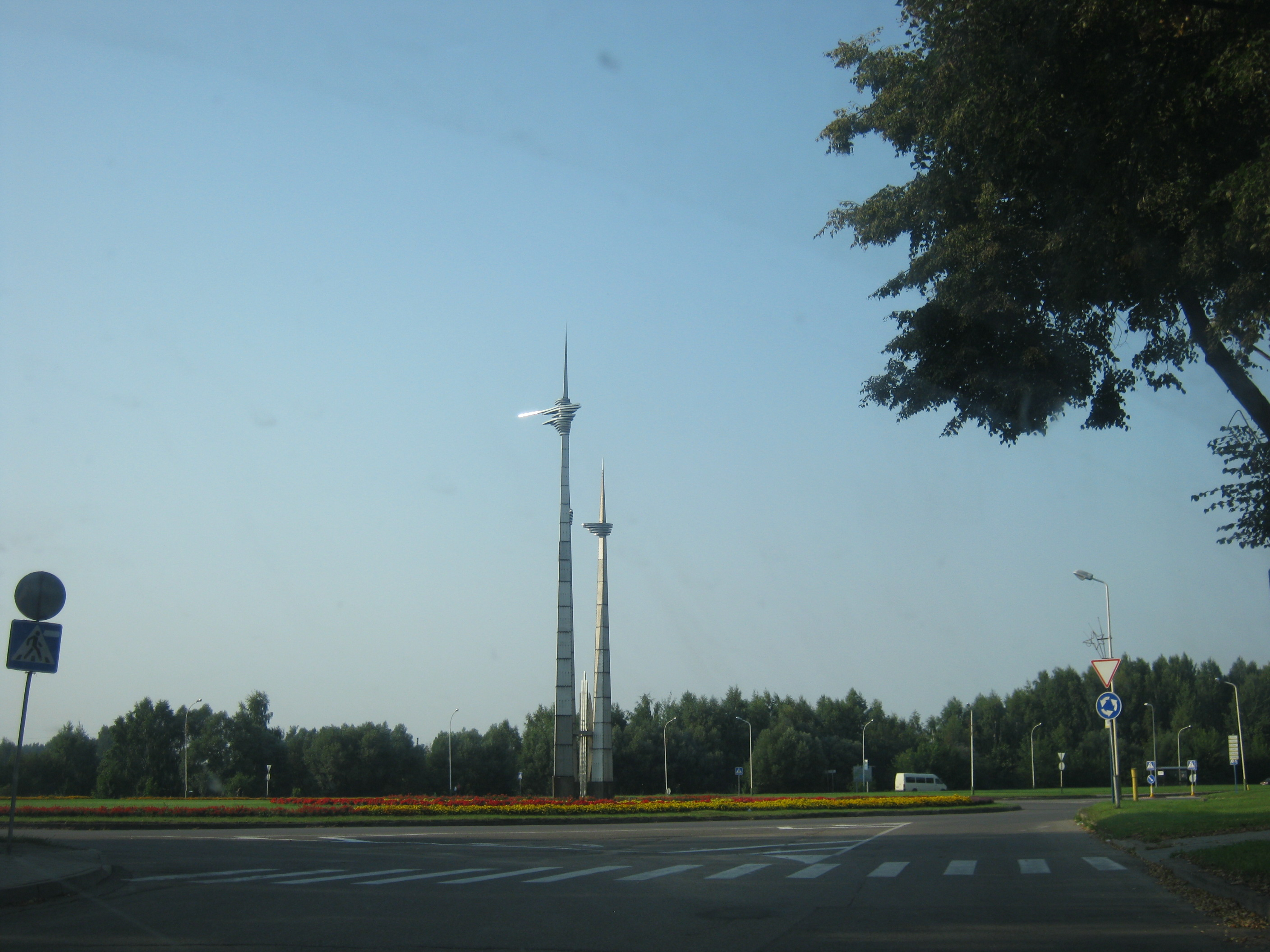 Elektrėnai. Dekoratyvinė skulptūra „Himnas darbui“, pastatyta 1975 m. Skulptorius Juozapas Kęstutis Patamsis.